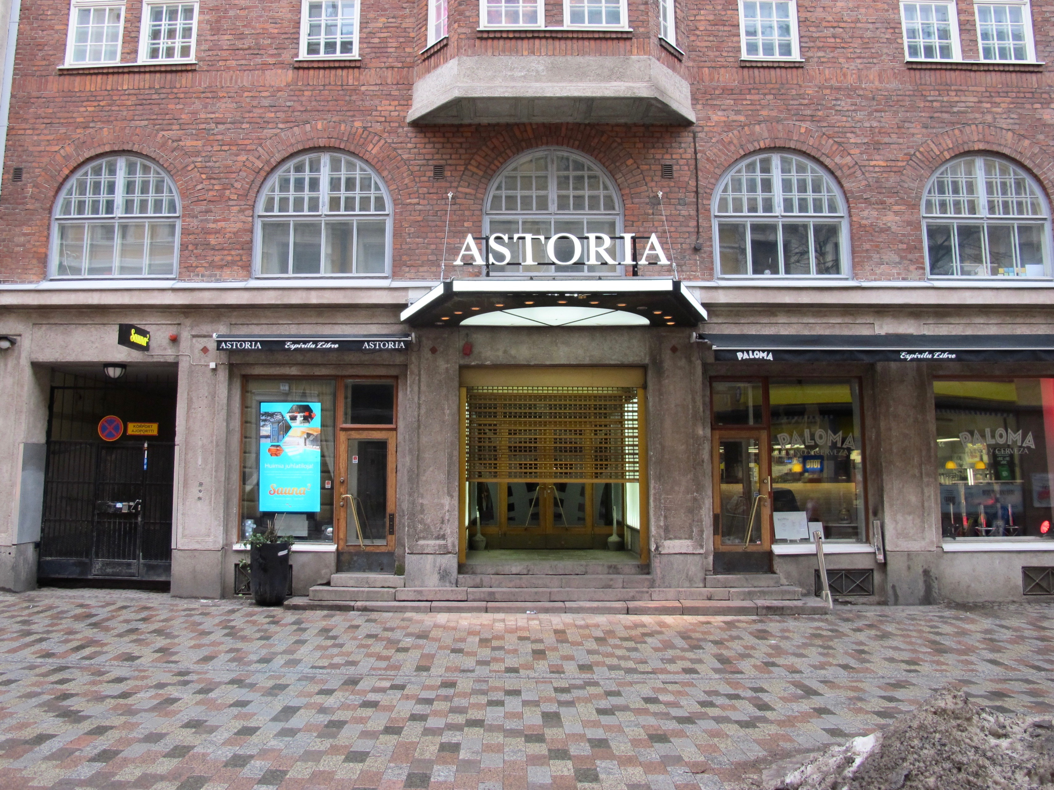 Astoria-sali kuvattu ulkoapäin Iso-Roobertinkadulla, Helsingissä 27. tammikuuta 2018.